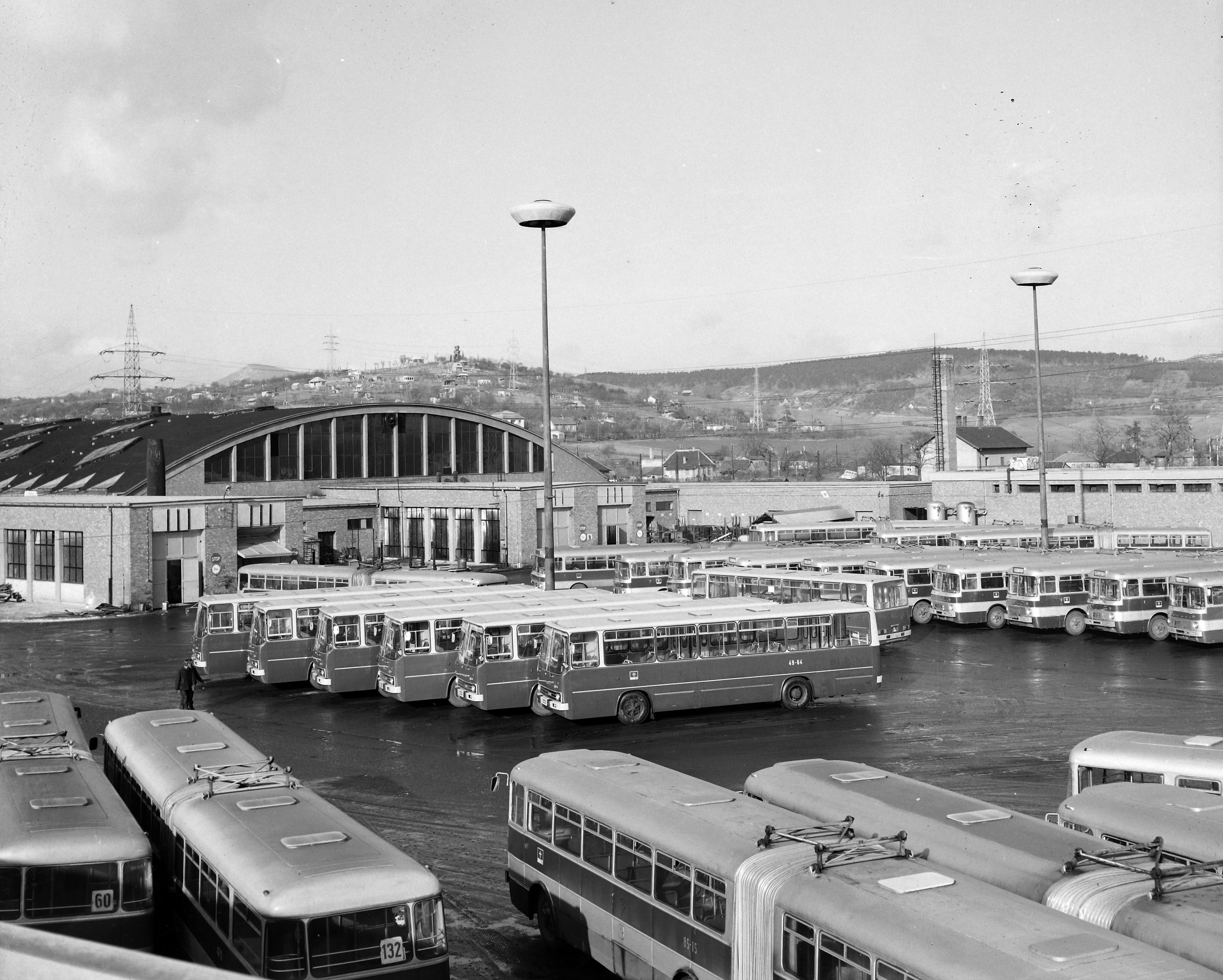 Pomázi út, Óbudai buszgarázs. Location: Hungary, Budapest III. Tags: bus, Ikarus-brand, Hungarian brand, Budapest Title: Pomázi út, Óbudai buszgarázs.